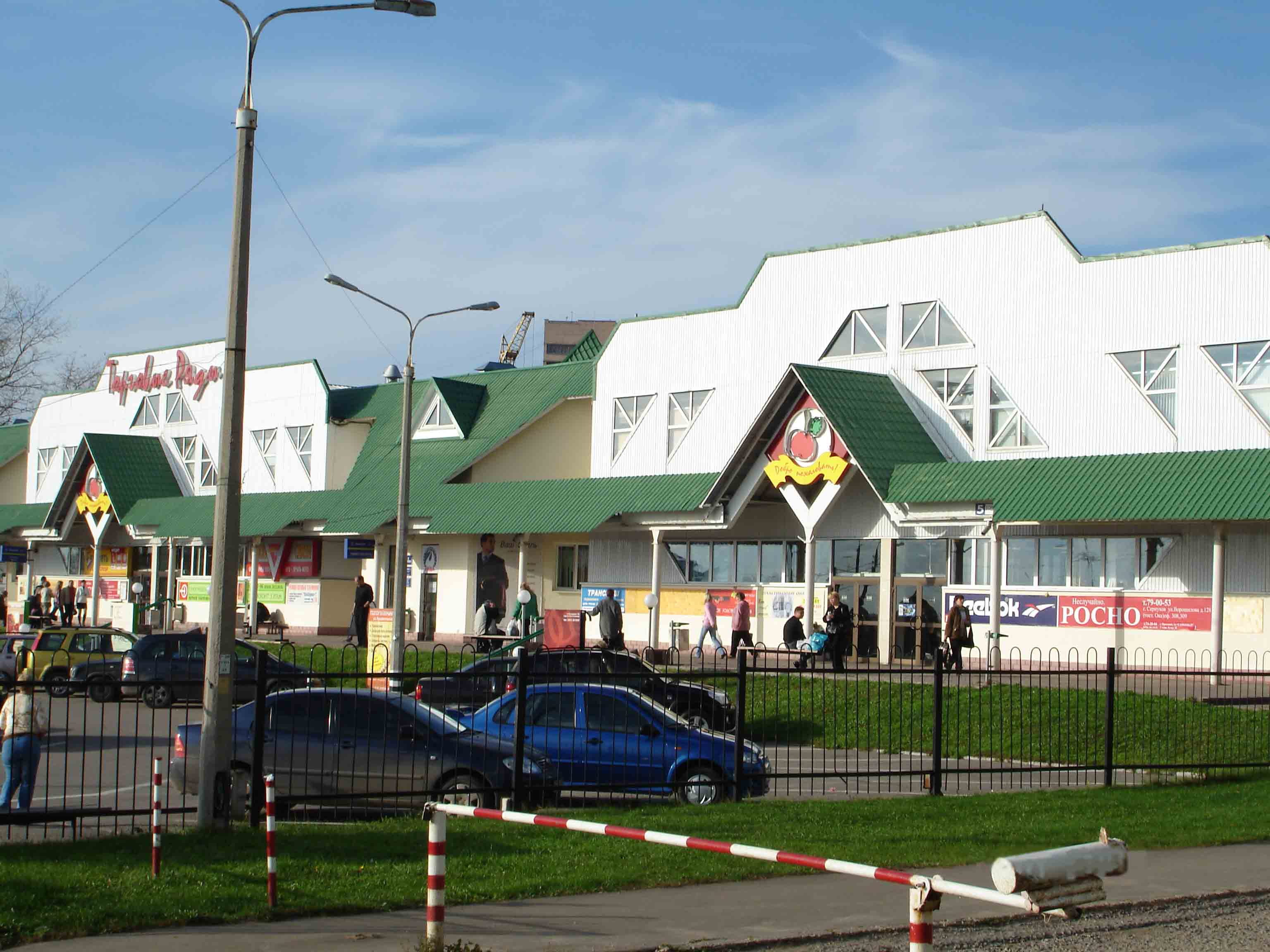 Центральный рынок в будний день Категория:Серпухов